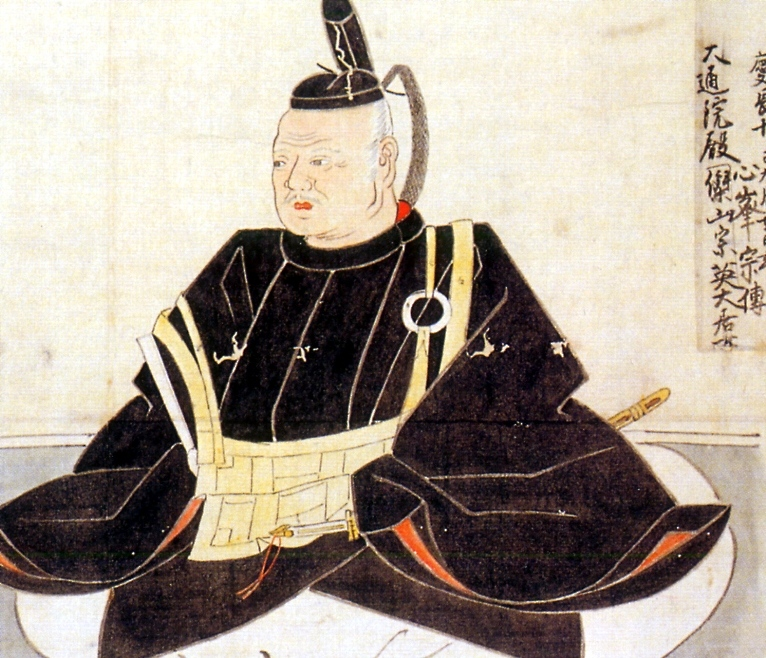 山内一豊 Yamanouchi Kazutoyo.